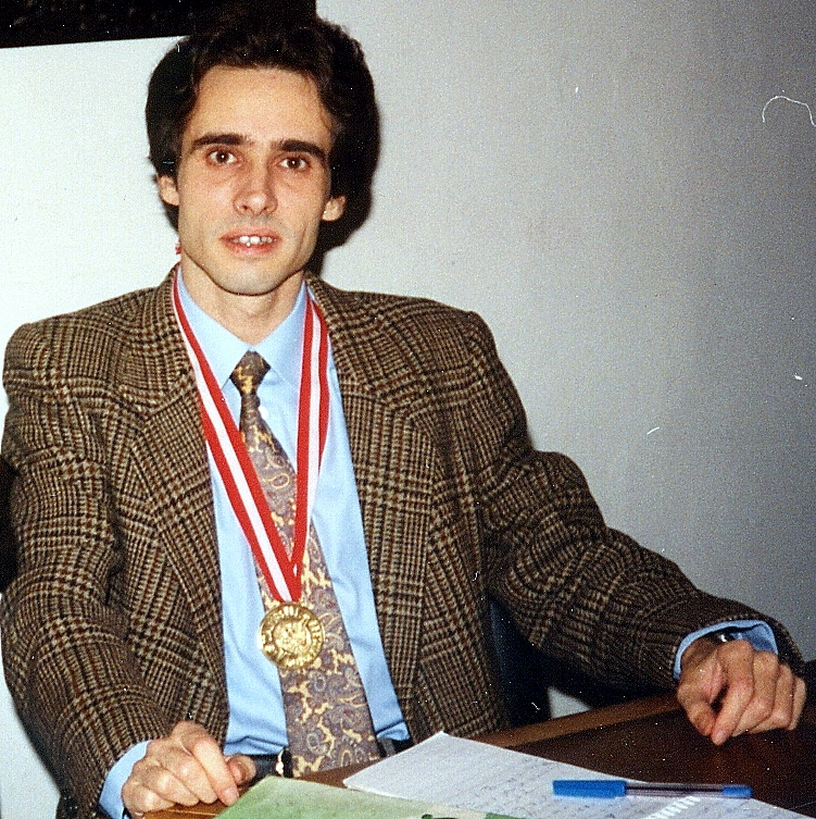 Riccardo Bruni, Campione Mondiale di Stenografia 1993, nello studio di Giovanni Vincenzo Cima